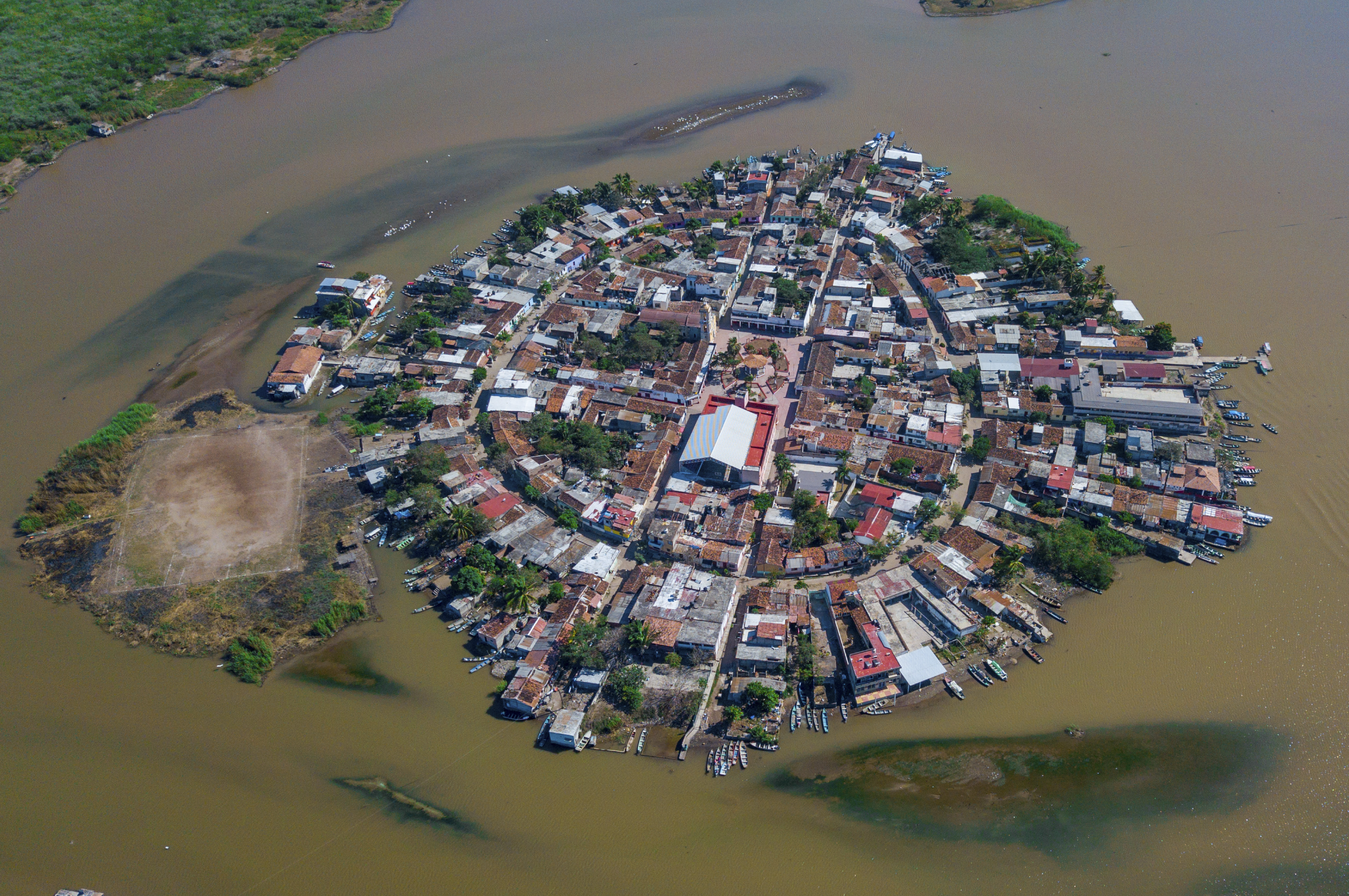 Isla Mexcaltitan